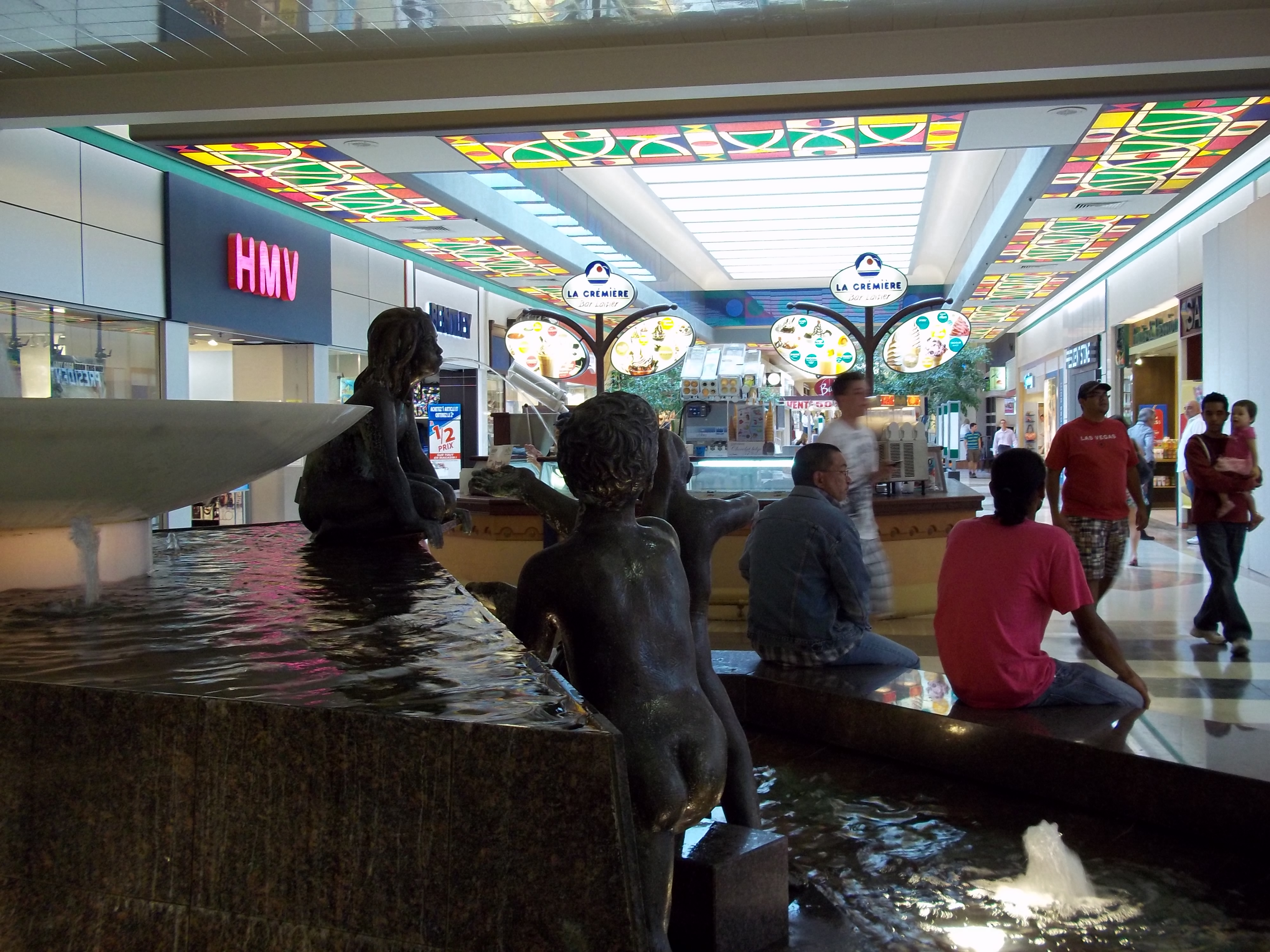 Place Versailles, Montréal. La sculpture de la fontaine est Joie de vivre d'Augusto Escobedo, Mexico, 1965.